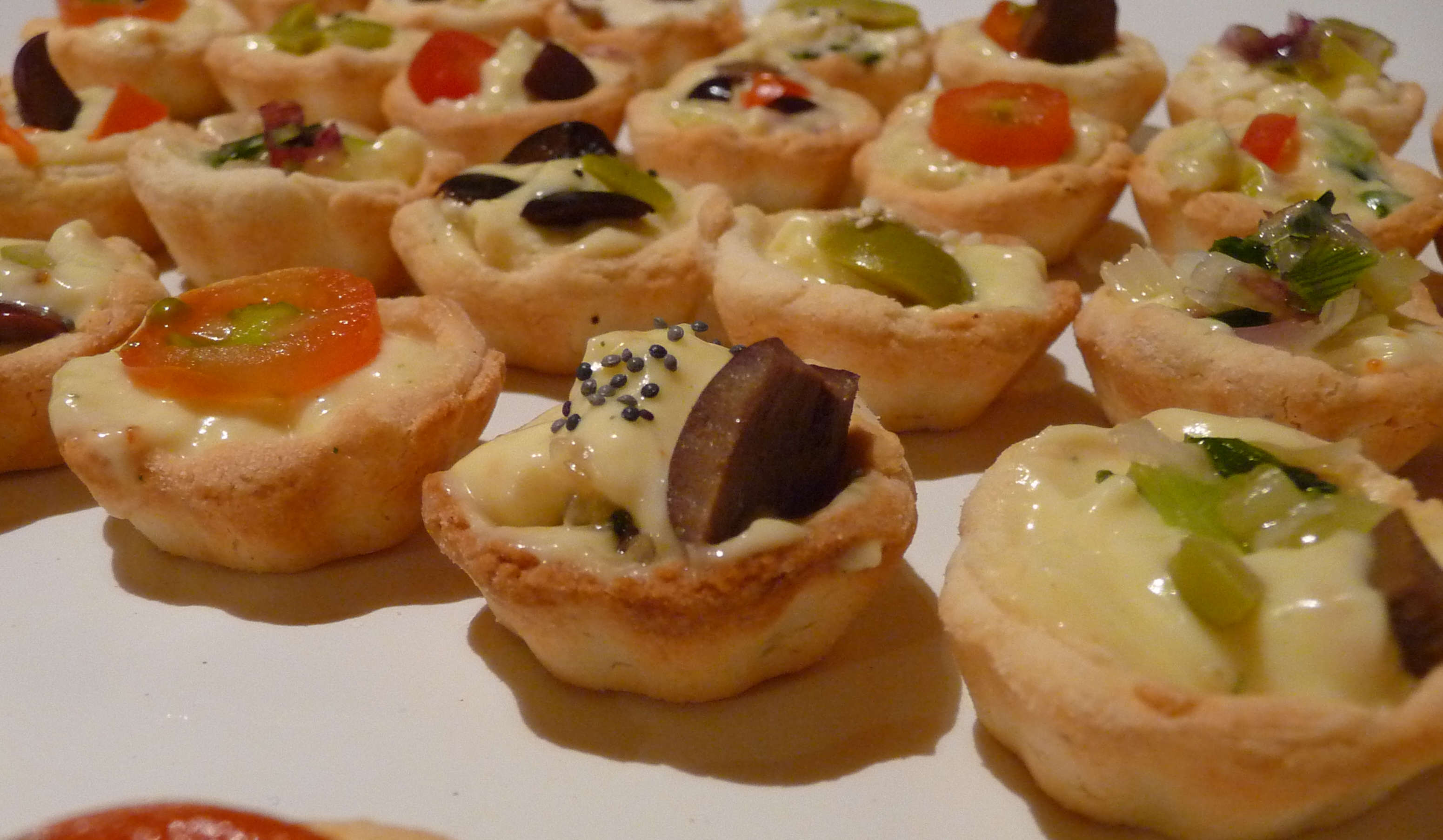 Pequeños canapés con quesos, tomate, aceitunas, mayonesa, cebolla de verdeo, etc